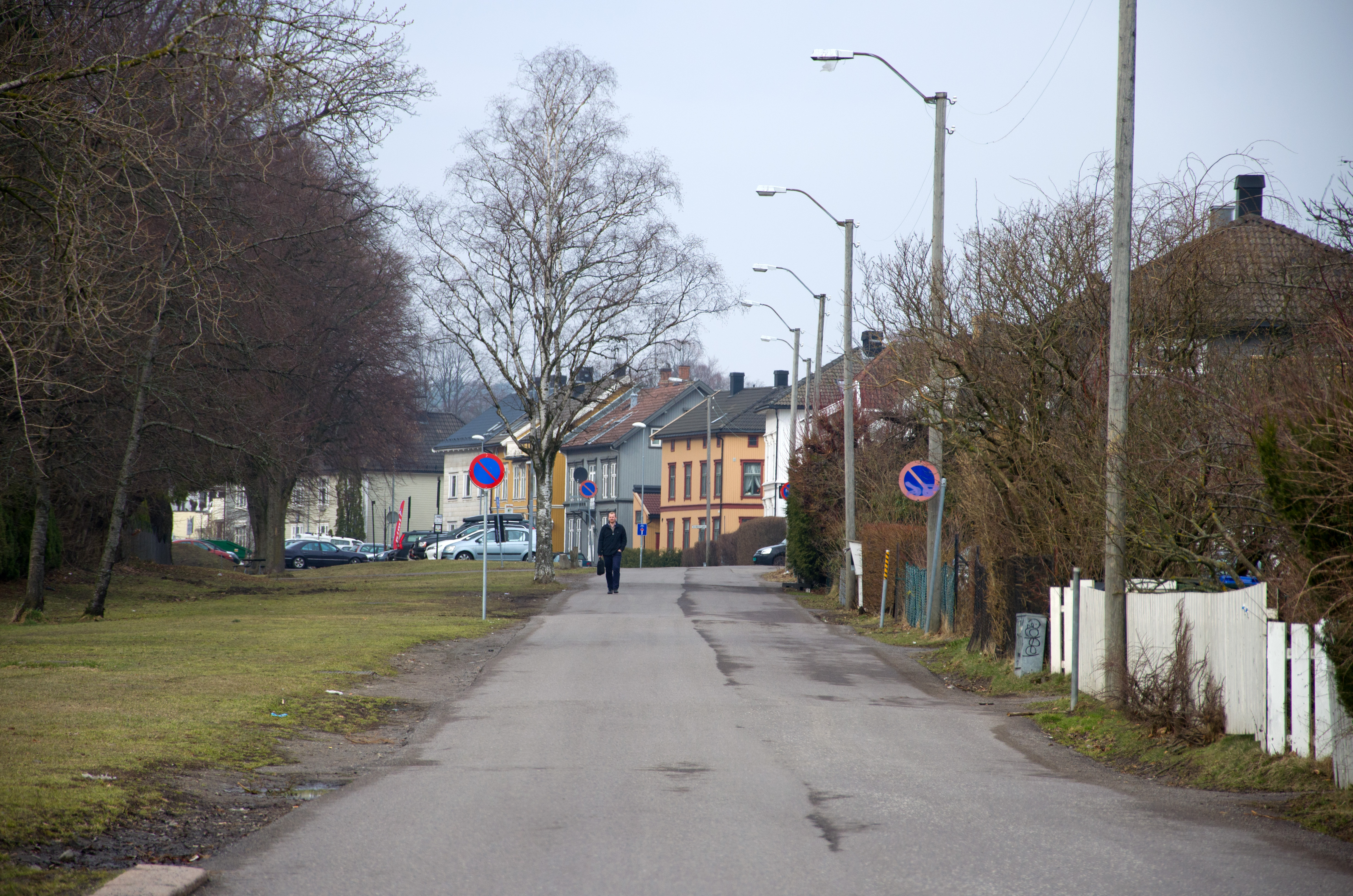 Vestfoldgaten, Tønsberg